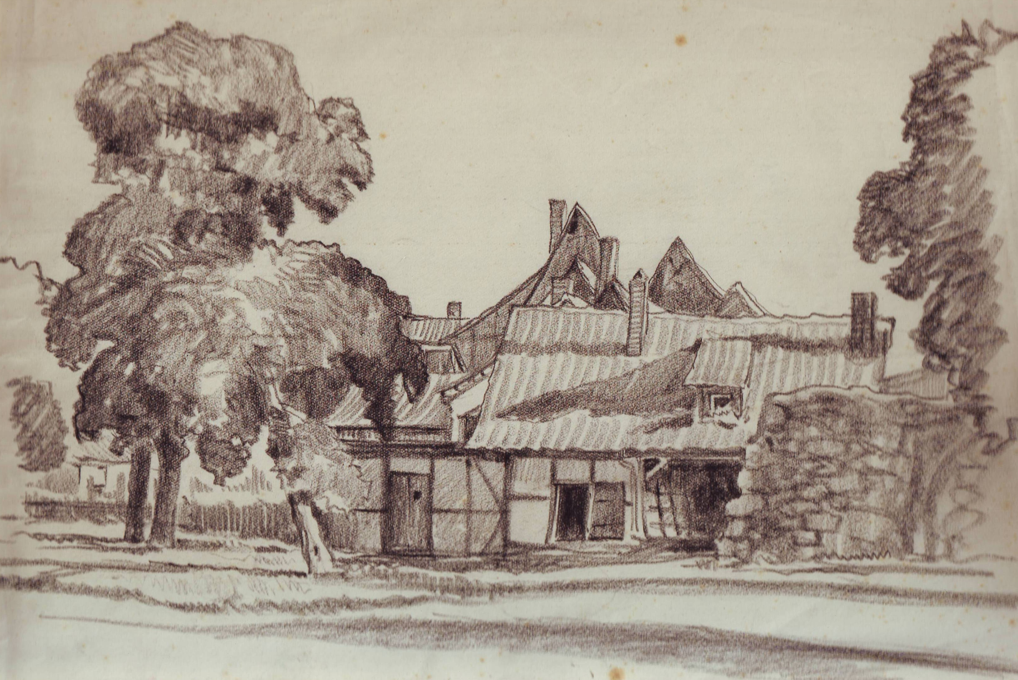 Historische Zeichnung des Spendekirchhofs in Nordhausen um 1930